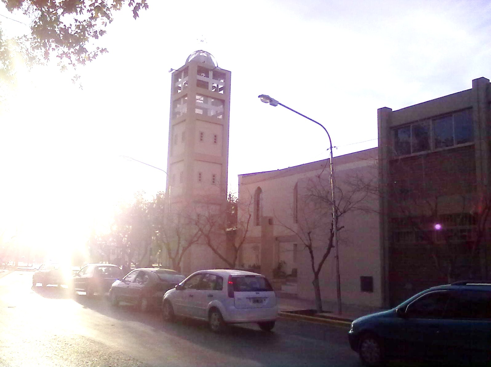 la ilgesia catolica de krausse